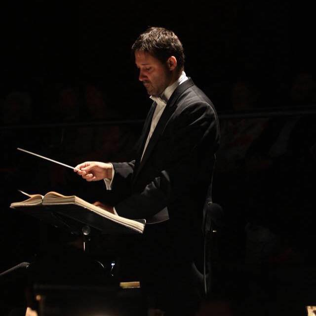 Dirección orquestal